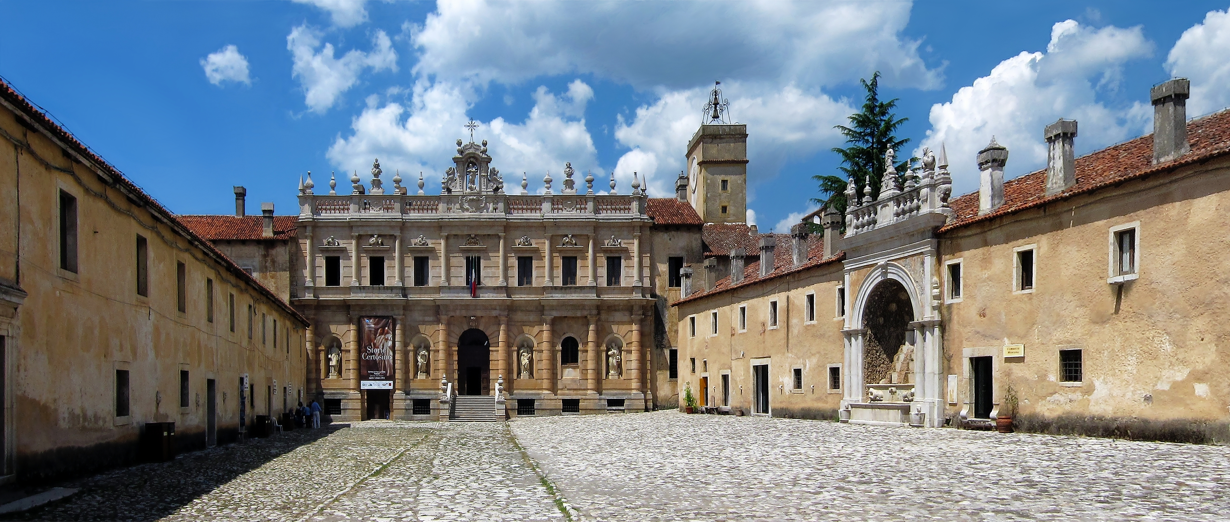 Cour d'entrée de la Certosa di San Lorenzo (Padula).